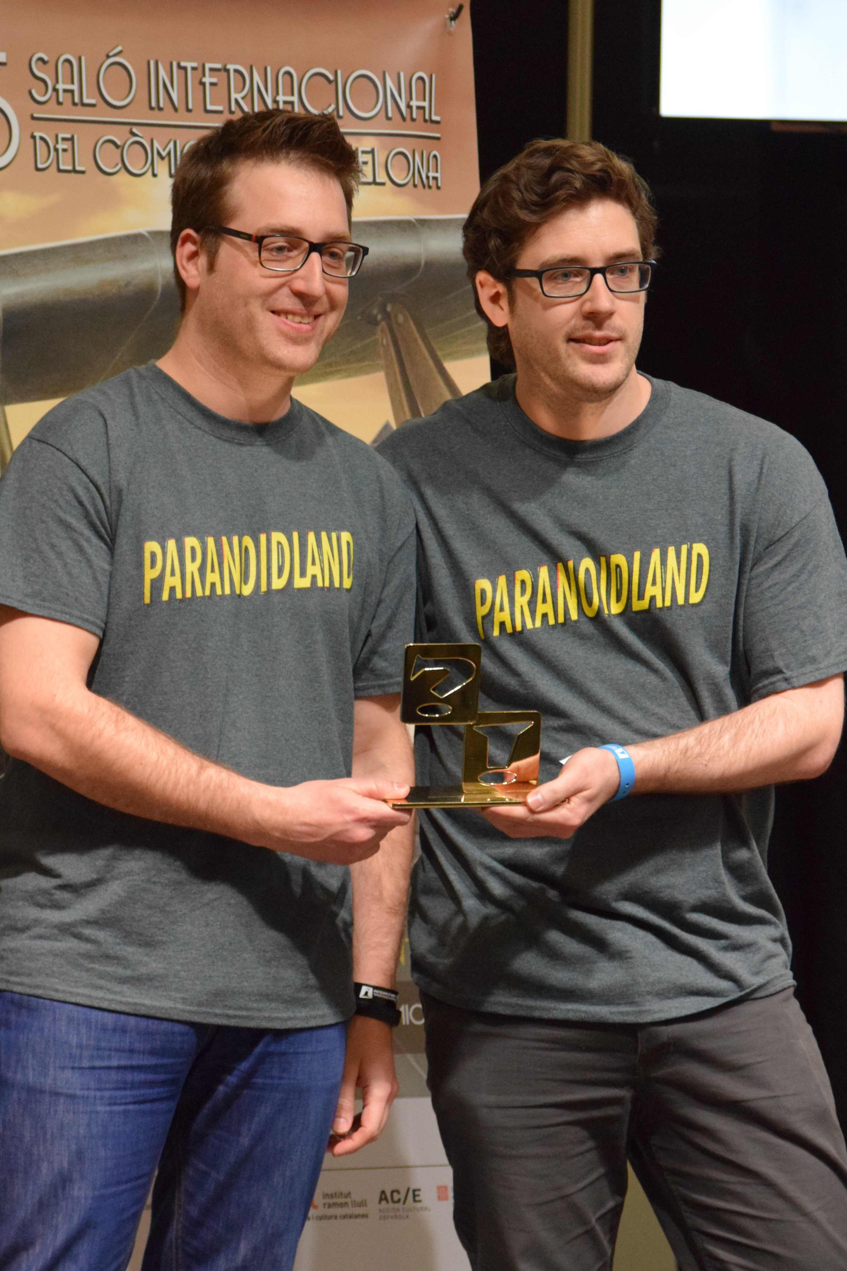 Bouman i el seu germà (Miguel Martínez), representants del fanzine Paranoidland, mostrant el guardó concedit per haber guanyat el premi al Millor fanzine. Saló Internacional del Còmic de Barcelona de 2017. Divendres 31 de març de 2017.